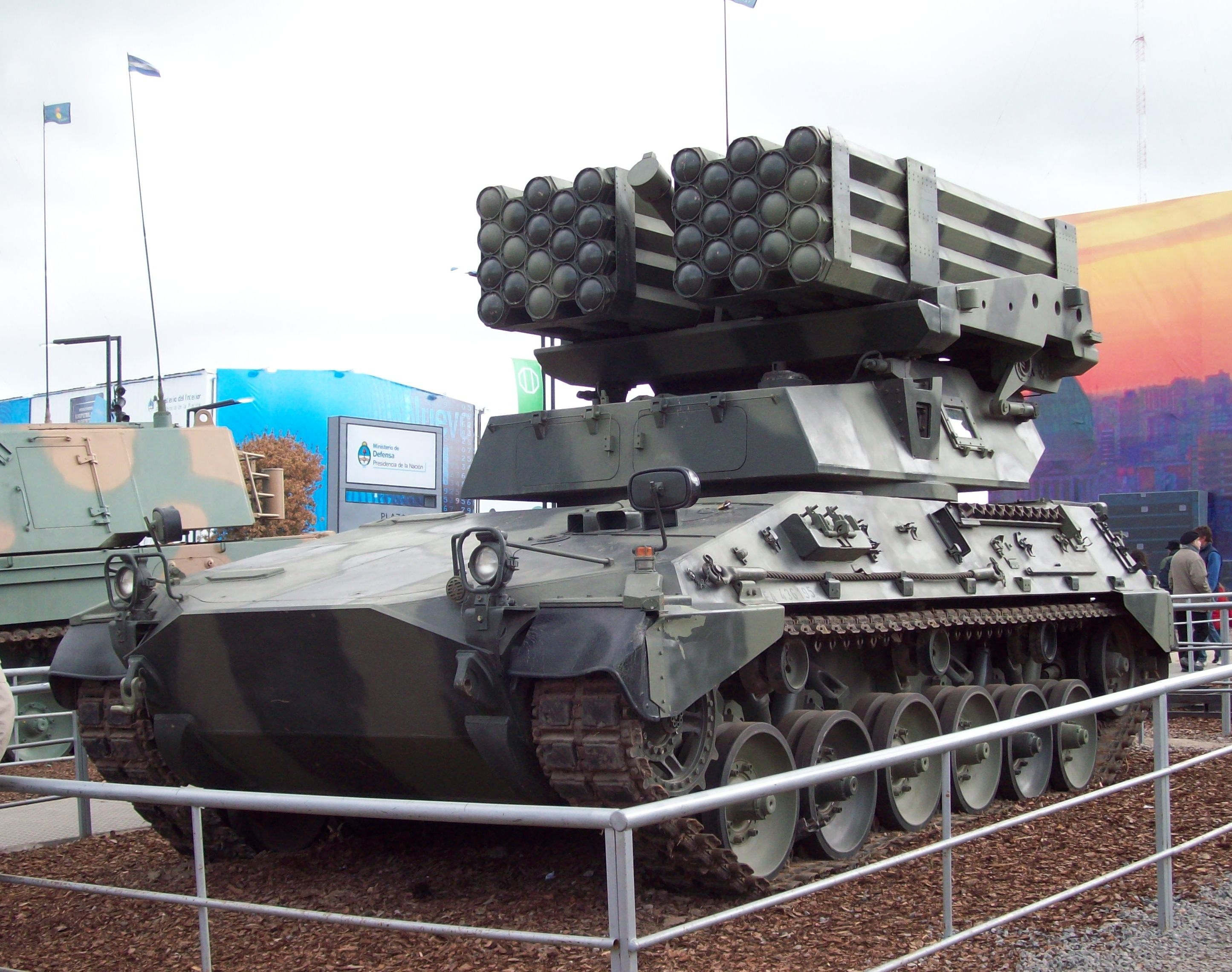 Vehículo oruga lanzamisiles en Tecnópolis.